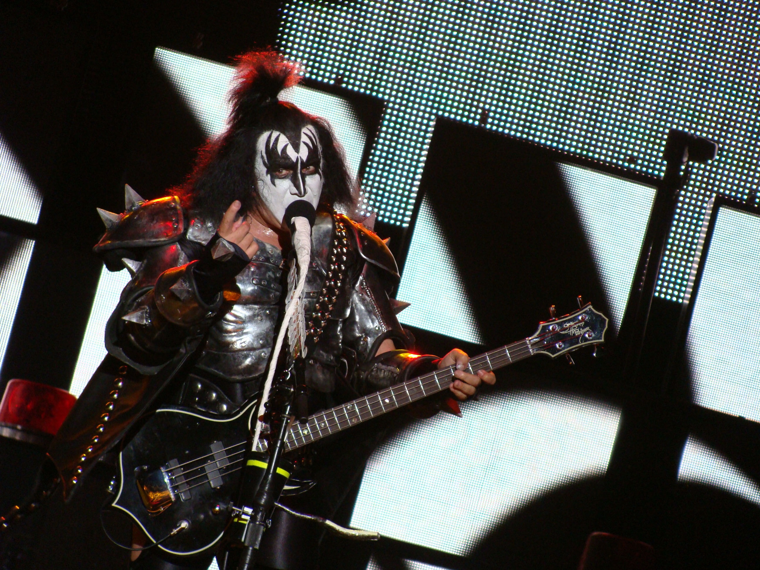 Gene Simmons, en una actuación del grupo KISS en Vitoria-Gasteiz, en el Azkena Rock Festival.